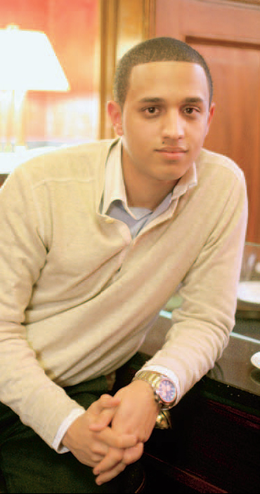 Bild des Bundesvorsitzenden der Schüler Union Deutschlands, Younes Ouaqasse